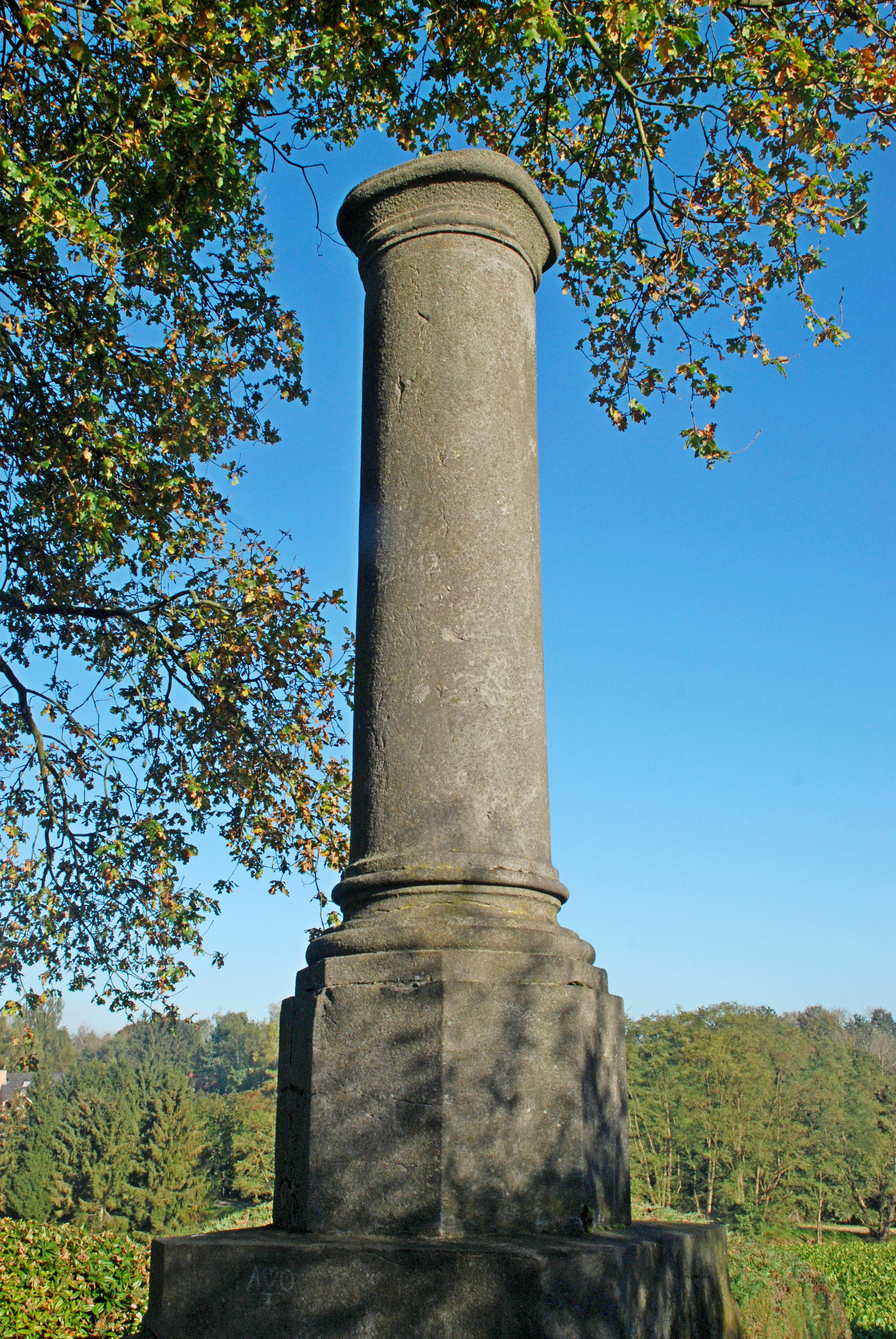 Belgique - Brabant wallon - Lasne - Monument au comte von Schwerin (bataille de Waterloo)